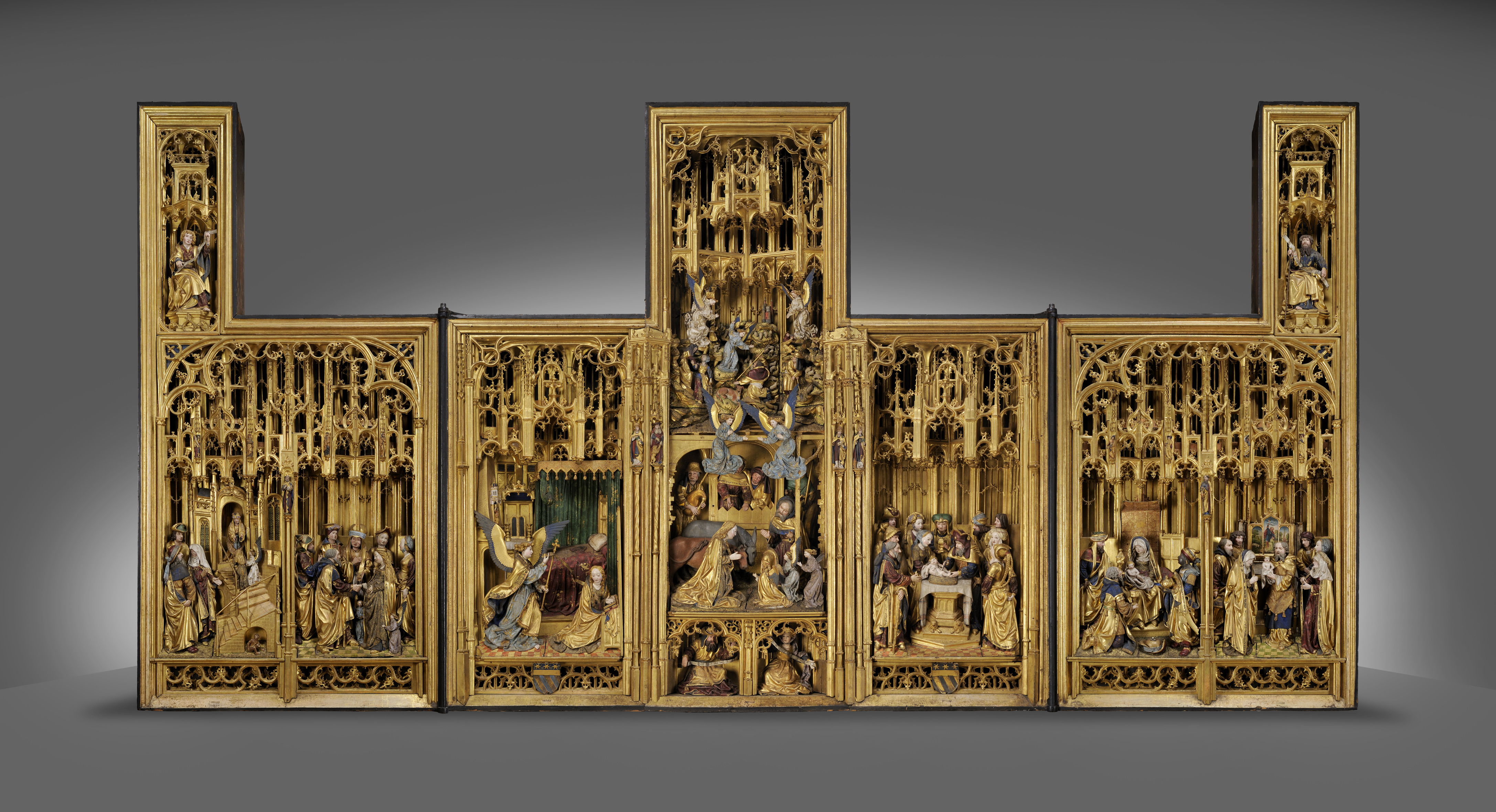 Retable de Saluces. Partie sculptée intérieure.